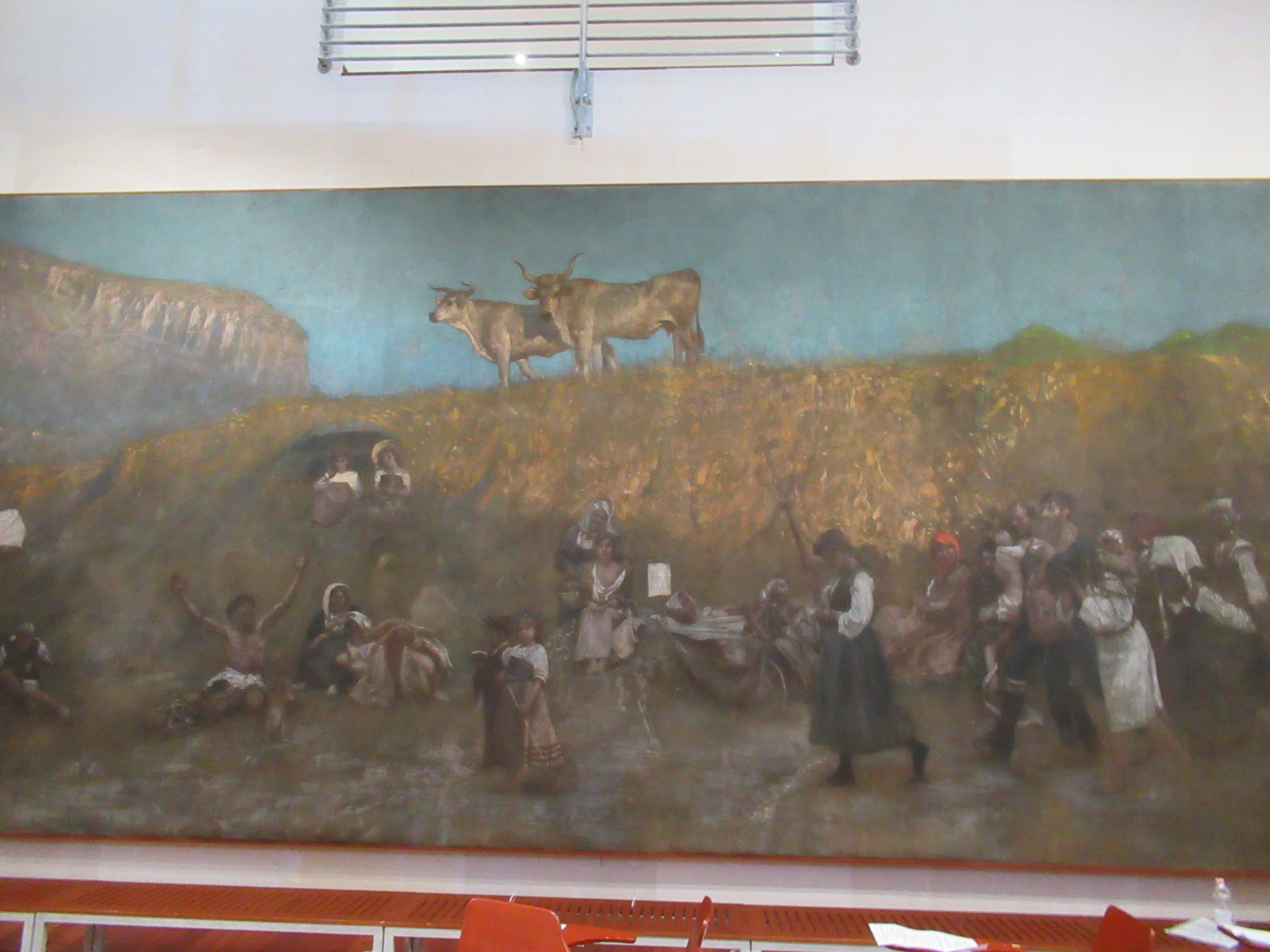 1900 giugno 2018 MUseo MIchetti Pellegrinaggio a Casalbordino (gli Storpi) di Francesco Paolo Michetti (1900)